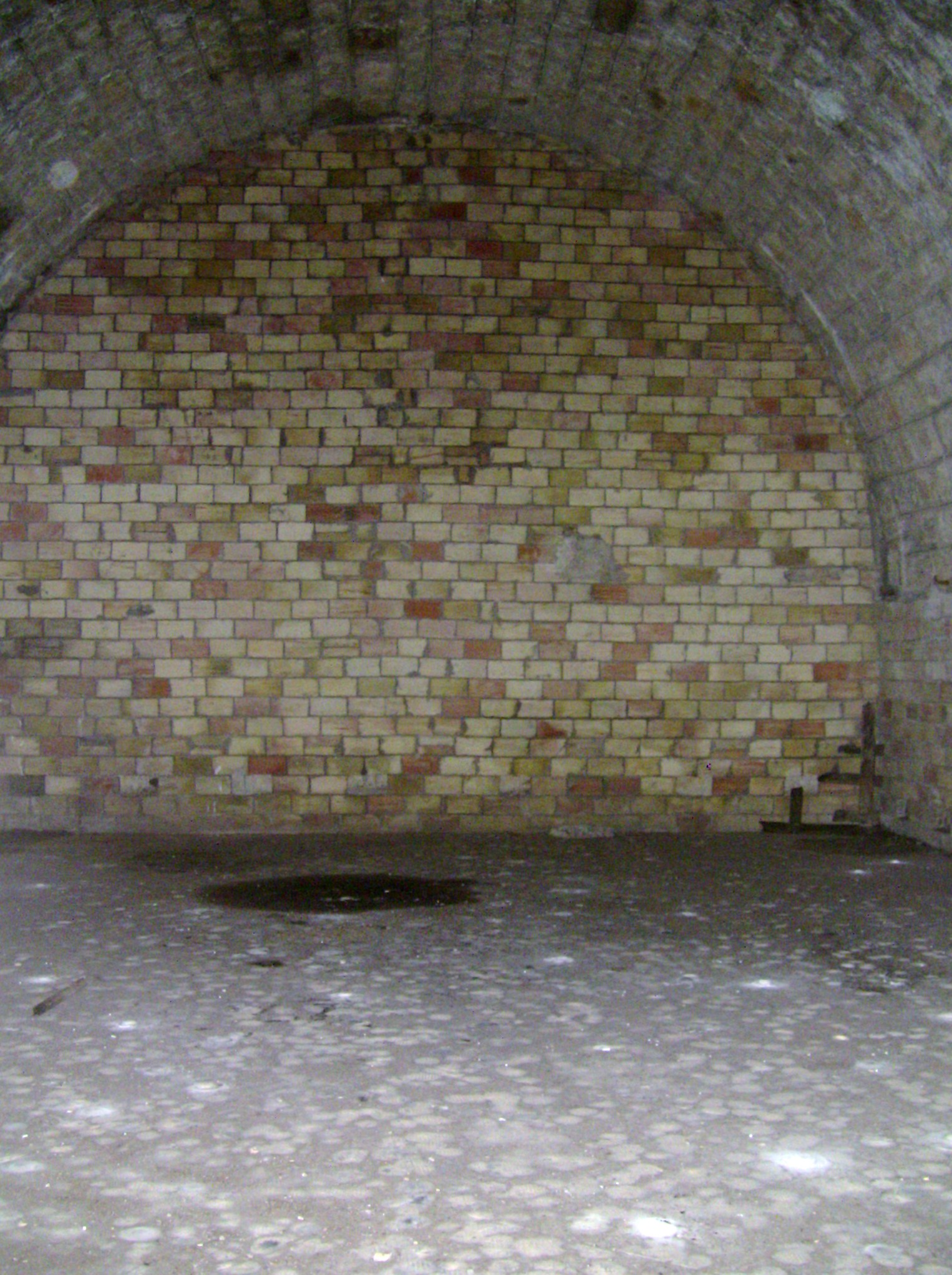 La chambre I du magasin caverne du fort de Planoise, à Besançon (Doubs, France).